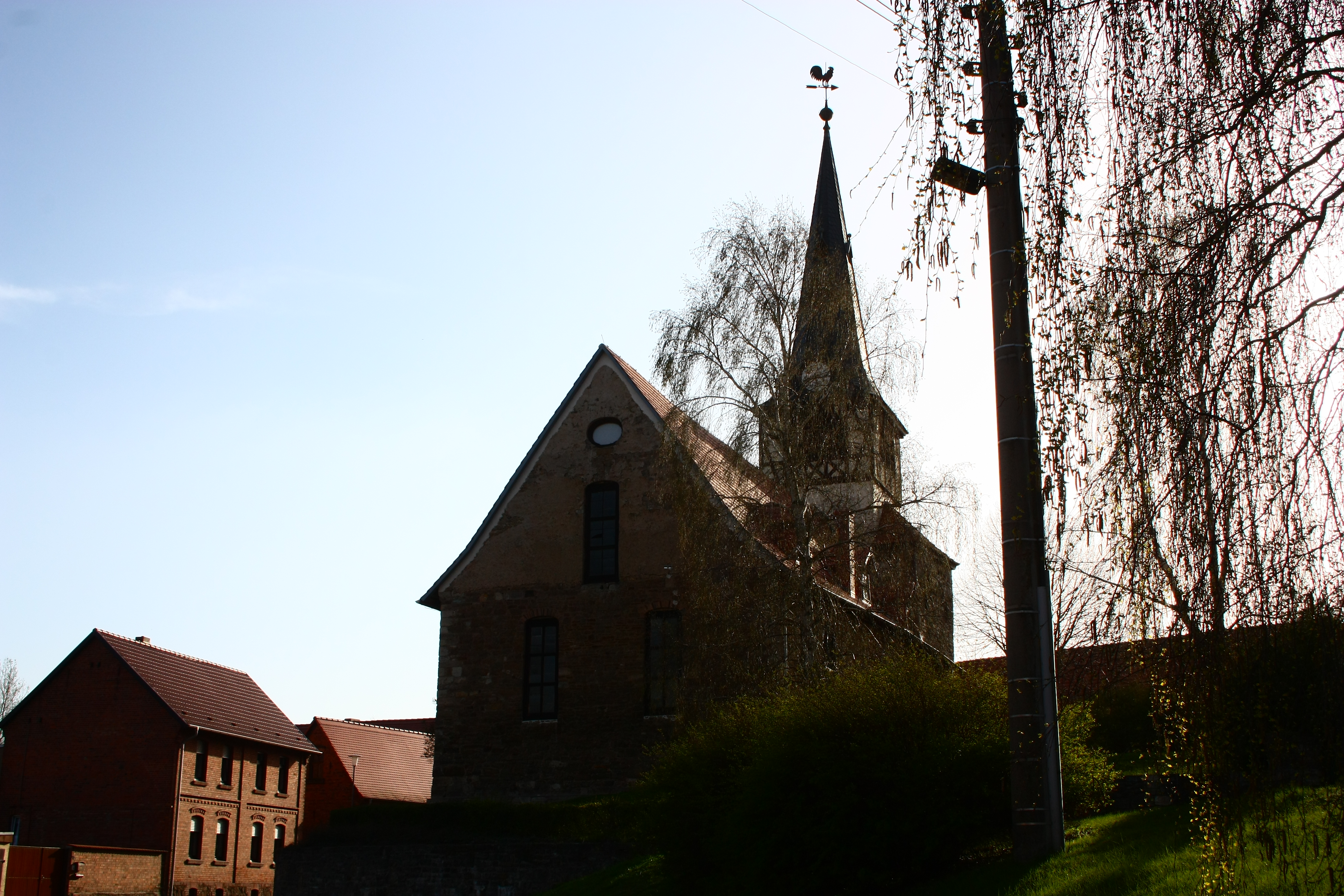 die Dorfkirche von Ulzigerode This is a photograph of an architectural monument. 65139